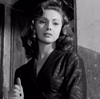 Sylva Koscina, screenshot da Il ferroviere catturato personalmente